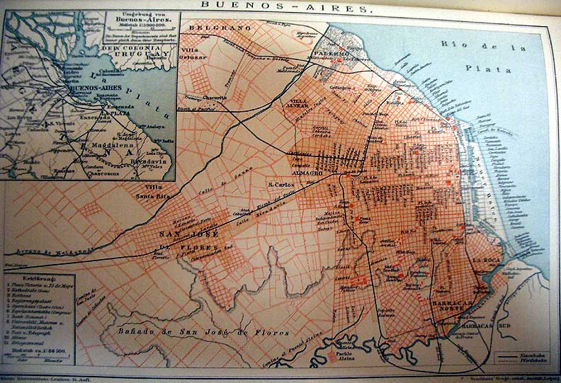 Stadtkarte von Buenos Aires, ca. 1892